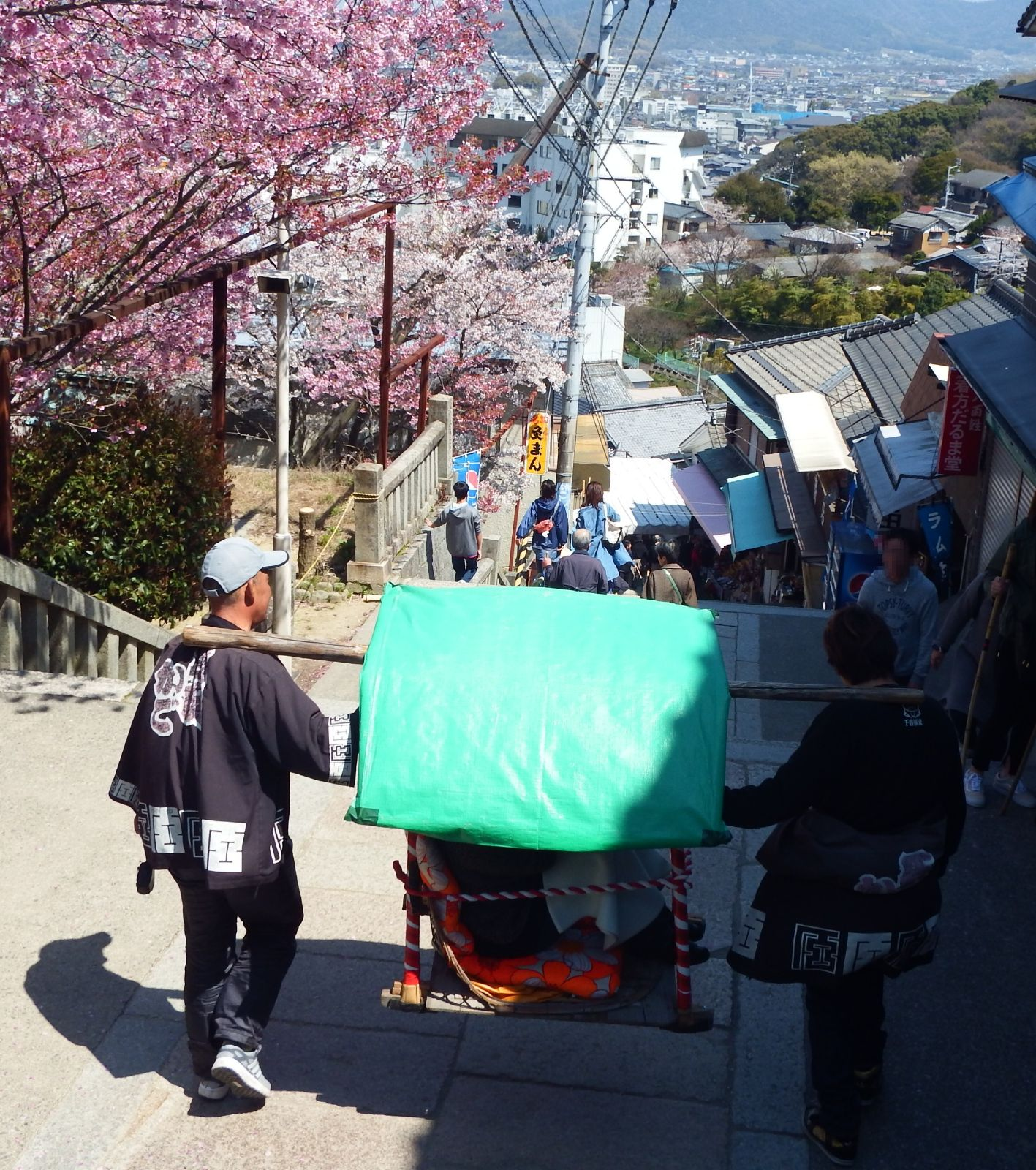 金刀比羅宮参道の籠